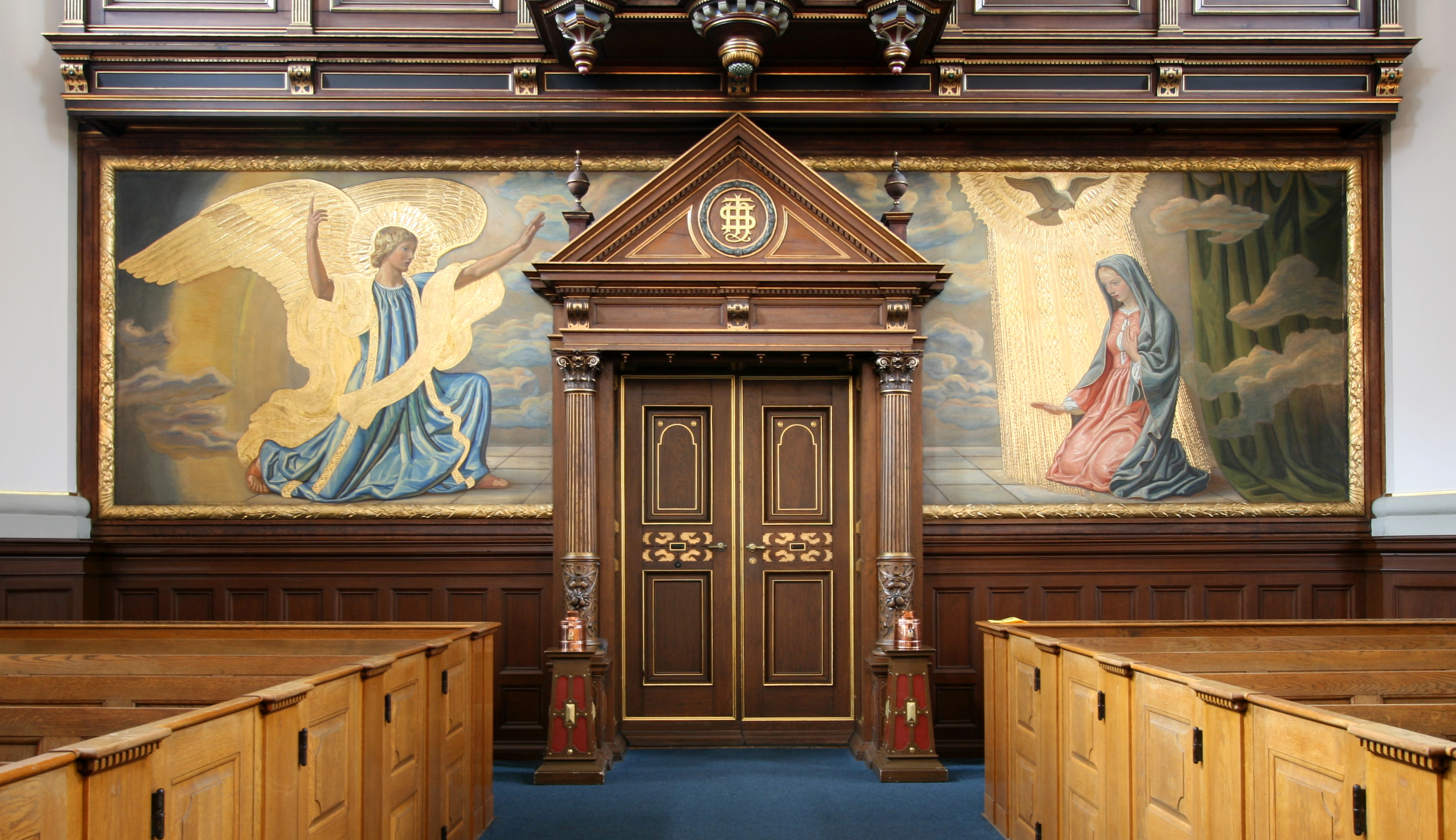 Helligåndskirken, Copenhagen, Denmark. "The Annunciation". Painting by Joakim Skovgaard. 1897.